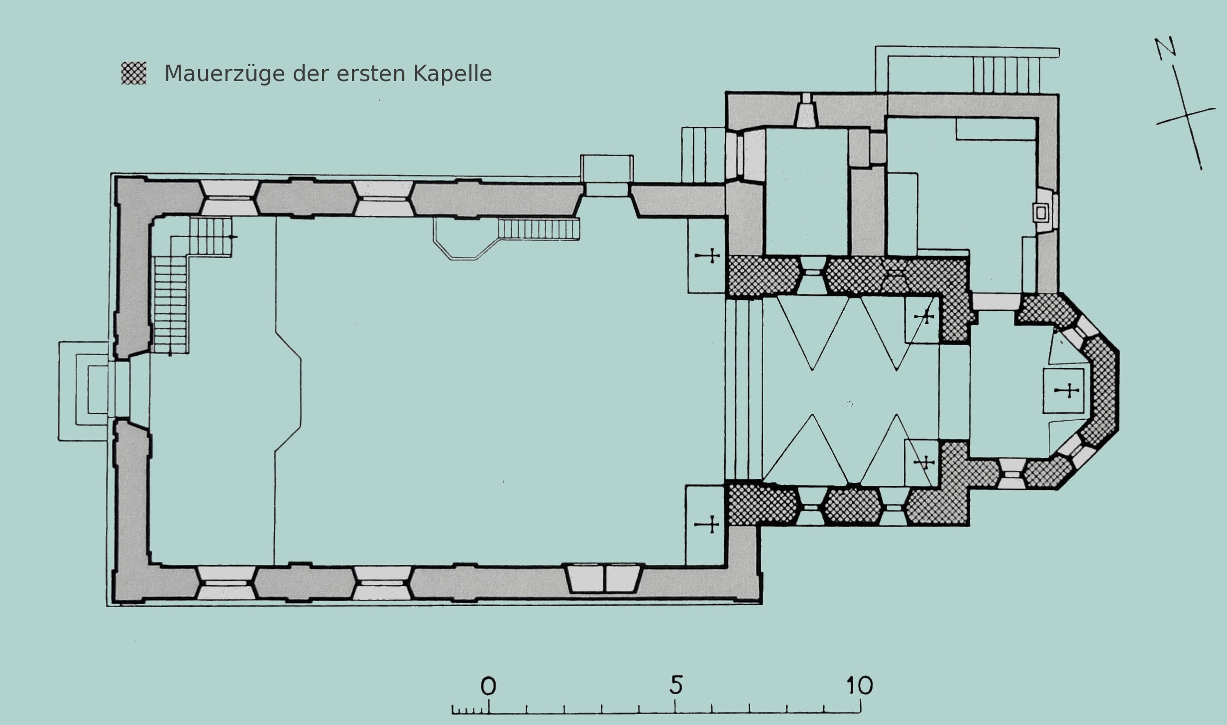 Wallfahrtskirche Maria Licht Plan, ohne Werktagskapelle